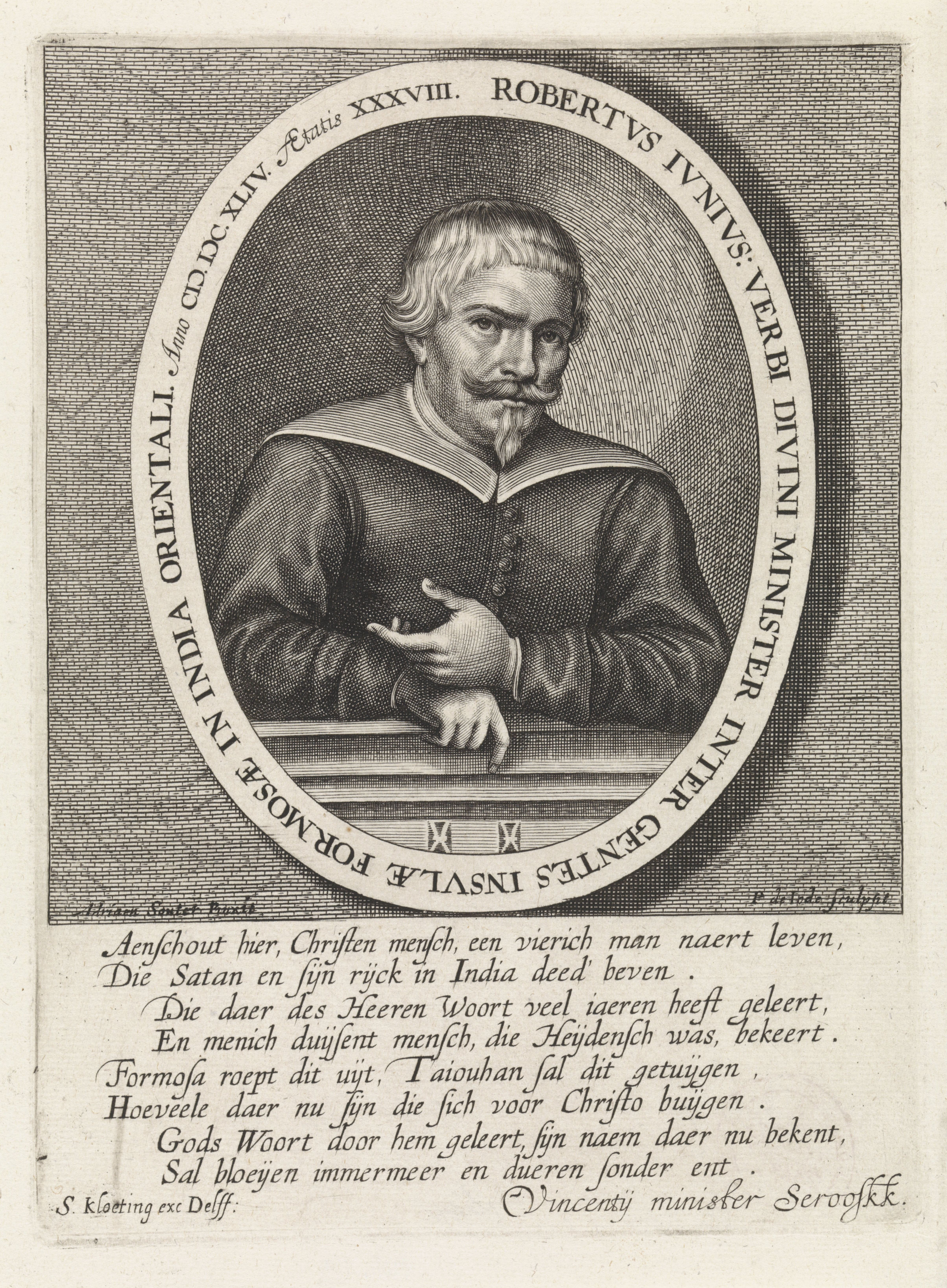 IdentificatieTitel(s): Portret van Robert JuniusObjecttype: prent Objectnummer: RP-P-OB-7897Catalogusreferentie: Hollstein Dutch 113FMP 2824-kOpschriften / Merken: verzamelaarsmerk, verso linksonder, gestempeld: Lugt 240Omschrijving: Busteportret van Robert Junius, op 38-jarige leeftijd. Het portret is gevat in een ovale omlijsting met een randschrift in het Latijn. In de marge een achtregelig gedicht in het Nederlands.VervaardigingVervaardiger: prentmaker: Pieter de Jode (II) (vermeld op object)naar schilderij van: Adrian Souter (vermeld op object)schrijver: Vincentij minister Serooskk. (vermeld op object)uitgever: Simon Kloeting (vermeld op object)Plaats vervaardiging: prentmaker: Antwerpenuitgever: DelftDatering: 1628 - 1670Fysieke kenmerken: ets en gravureMateriaal: papier Techniek: etsen / graveren (drukprocedé)Afmetingen: plaatrand: h 220 mm × b 162 mmOnderwerpWie: Robert JuniusVerwerving en rechtenVerwerving: overdracht van beheer 1816Copyright: Publiek domein